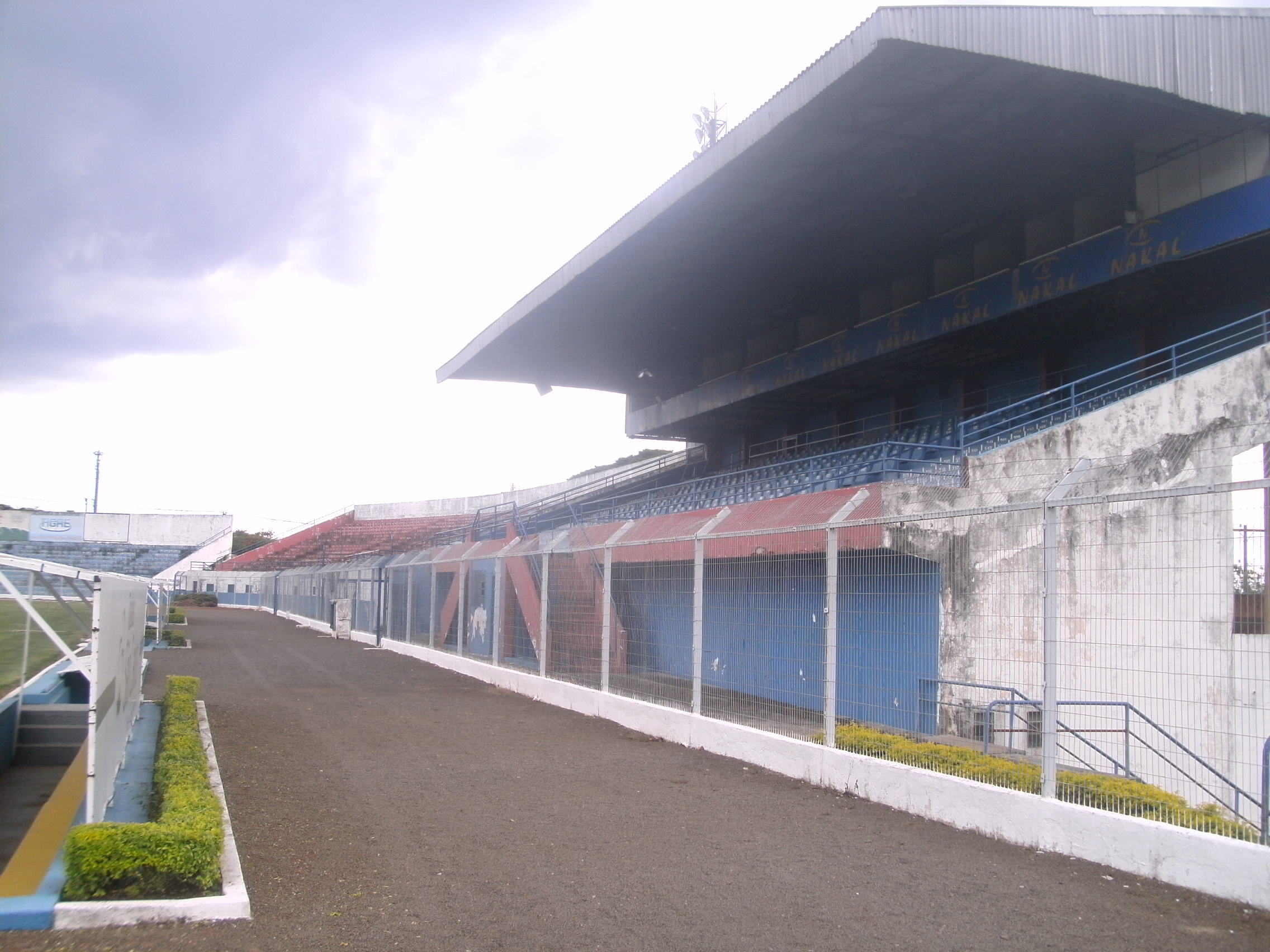 Patinhas esteve aqui - Estadio do São Carlos 5